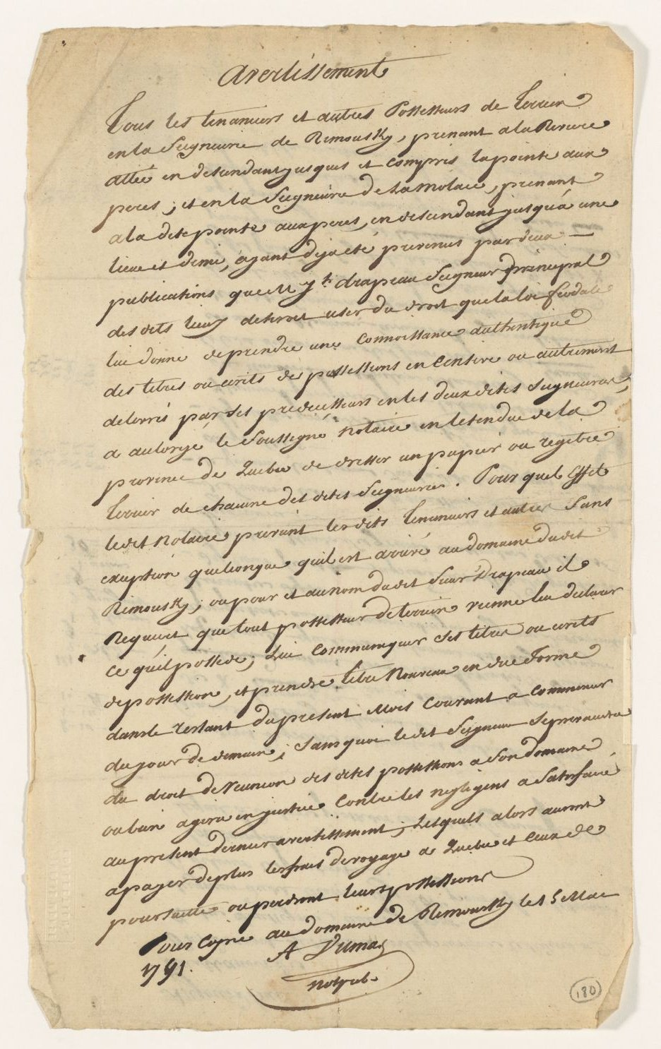 Avertissement par le notaire A. Dumas à tous les tenanciers et prossesseurs de terrains des seigneuries de Rimouski et de la Mollaie, que le sieur Joseph Drapeau, seigneur desdits lieux, entend procéder à la réalisation d'un papier ou registre terrier desdites seigneuries .